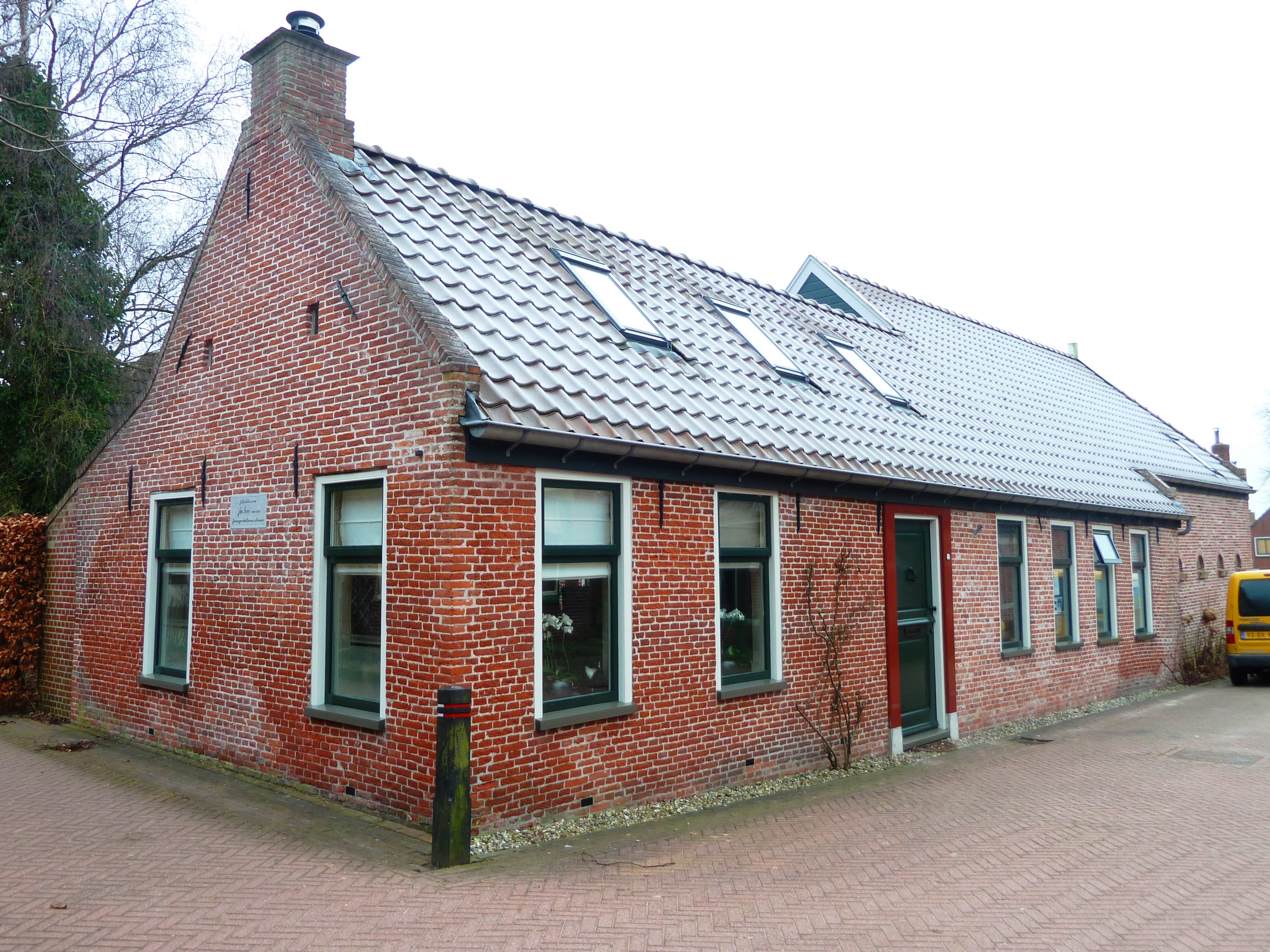 Geboortehuis van dichter Jan Boer in Rottum (Groningen).